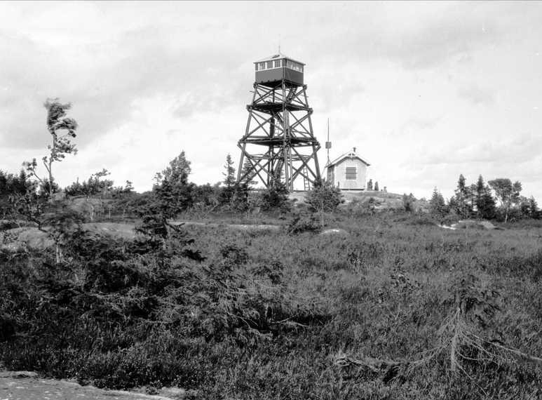 Tårnet på Varingskollen, 1928